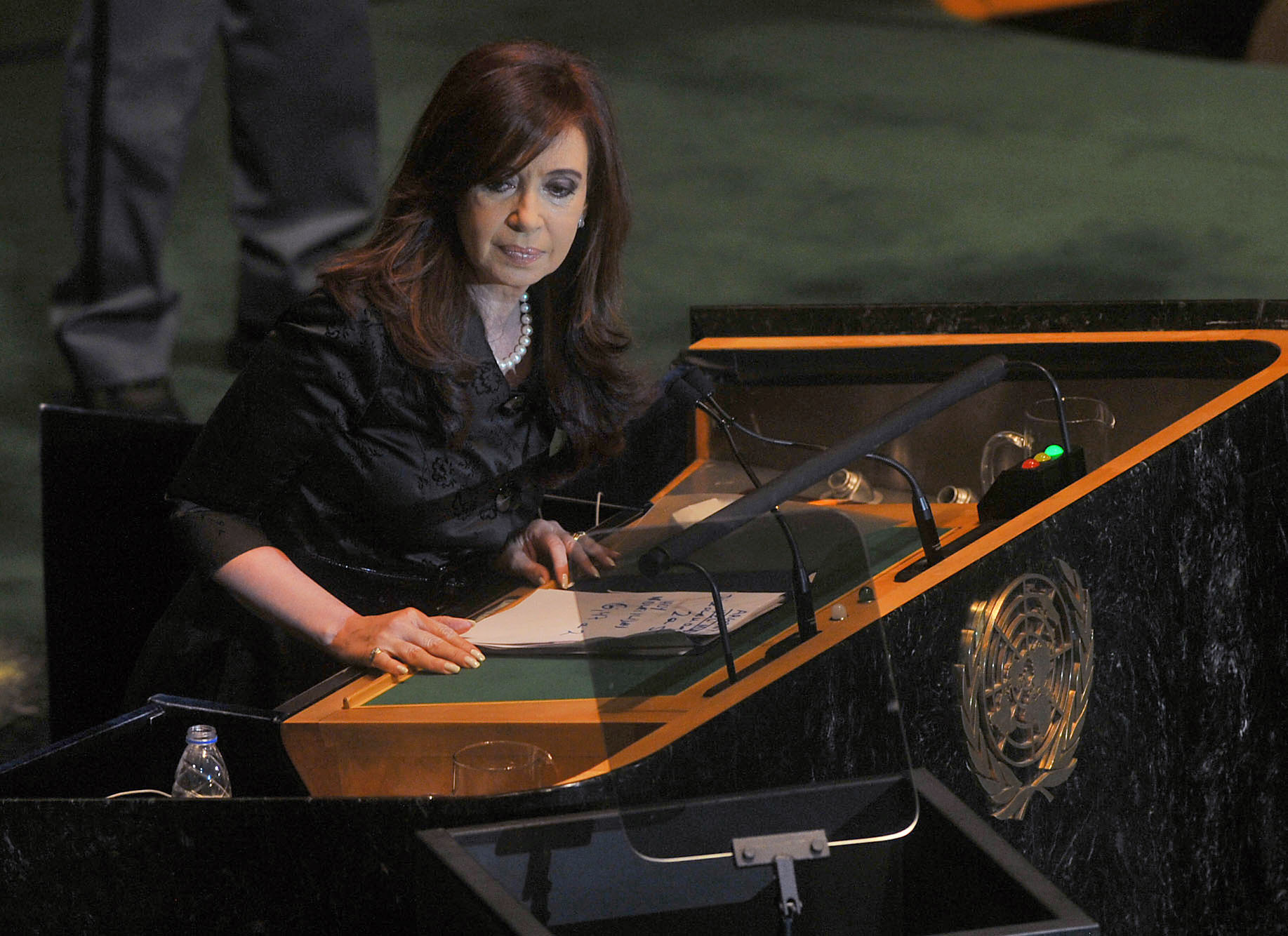 La presidenta Cristina Fernández habló ante la Asamblea General de Naciones Unidas (ONU), en un discurso en el que abogó por el diálogo sobre la soberanía de Malvinas y defendió el derecho de Palestina a ser tenido en cuenta como miembro de pleno derecho en la organización.